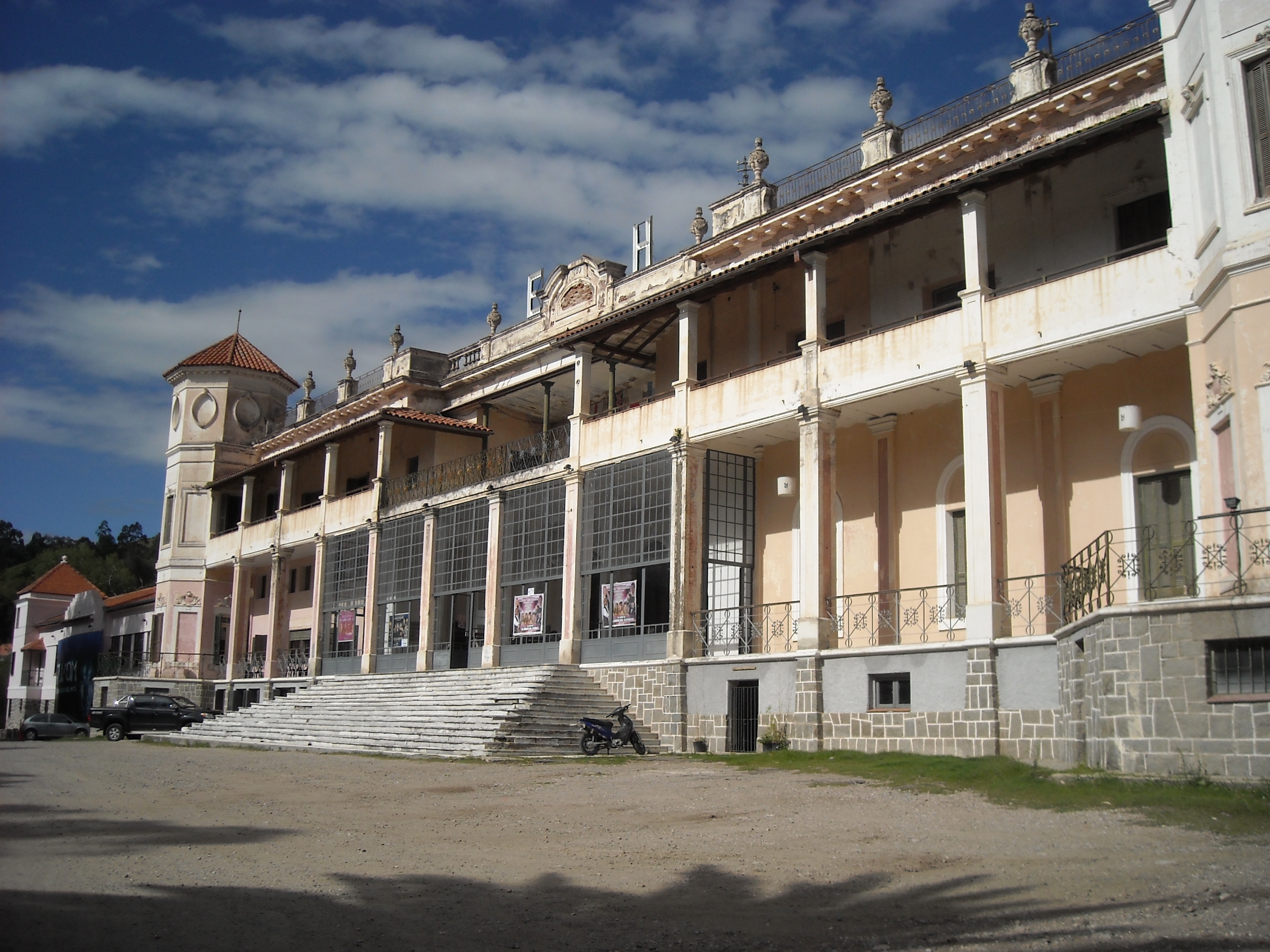 Fachada del Eden Hotel de La Falda.